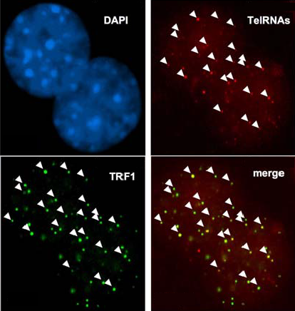 En aquesta imatge veiem quatre tipus d'inhibidors de la telomerasa